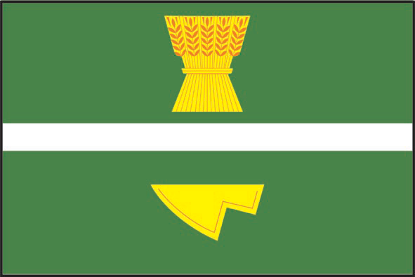 prapor obce Tichov